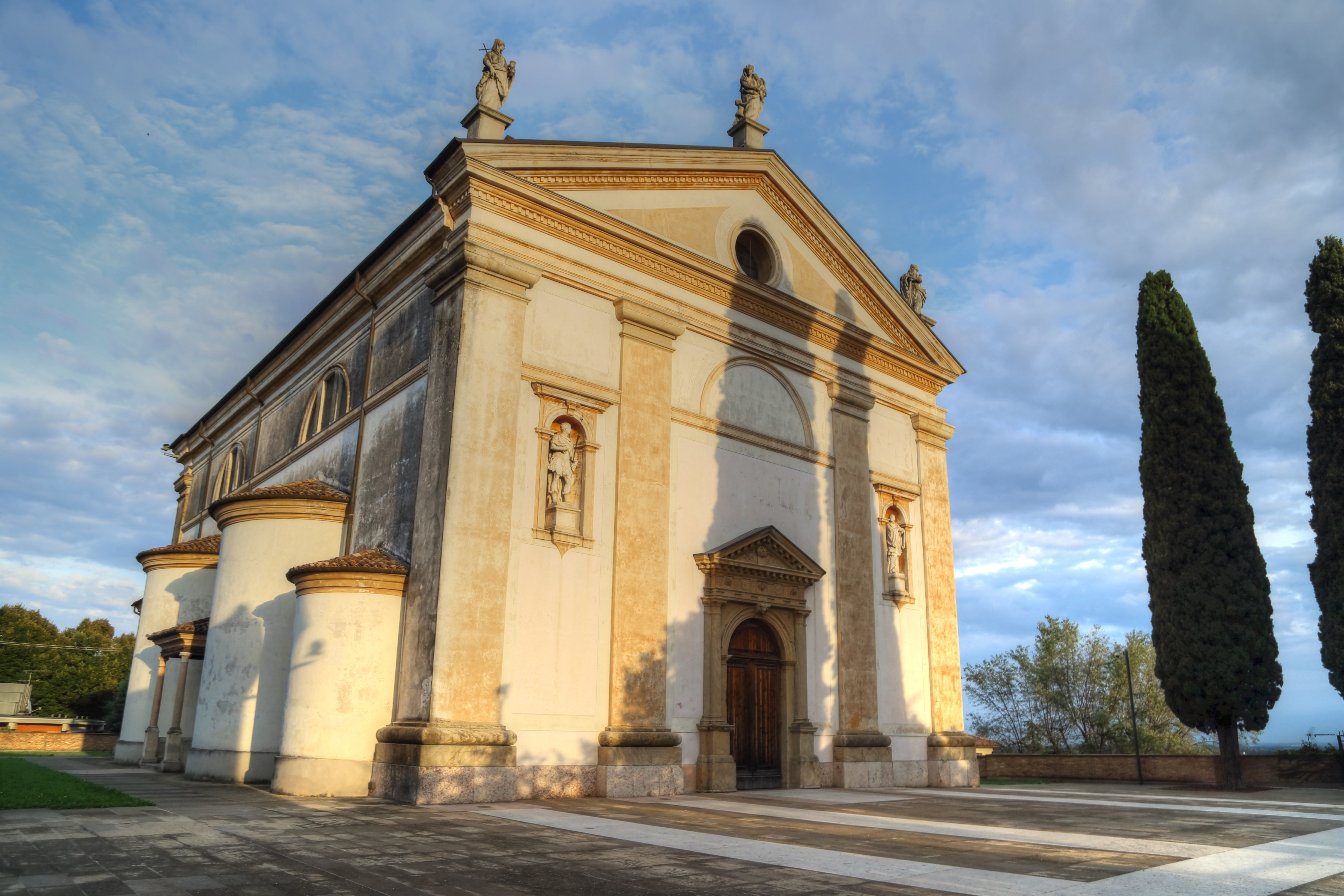 Veduta della chiesa di Santa Maria in Colle